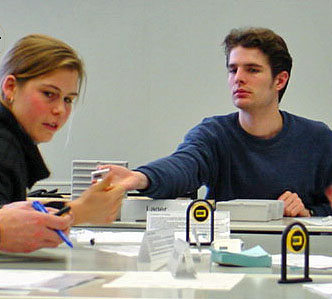 Szene im LogTime Planspiel